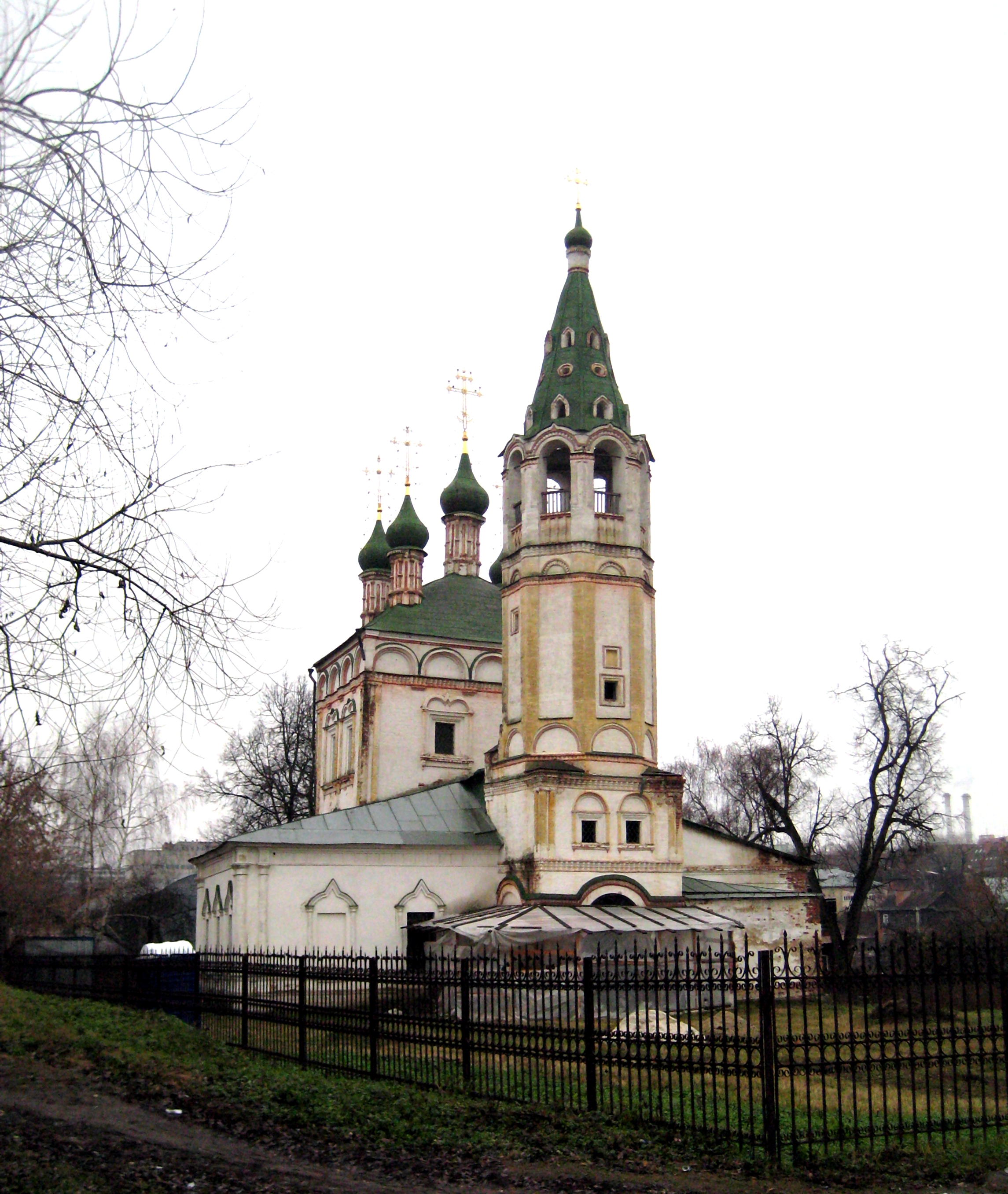 Церковь Святой Троицы (Серпухов)